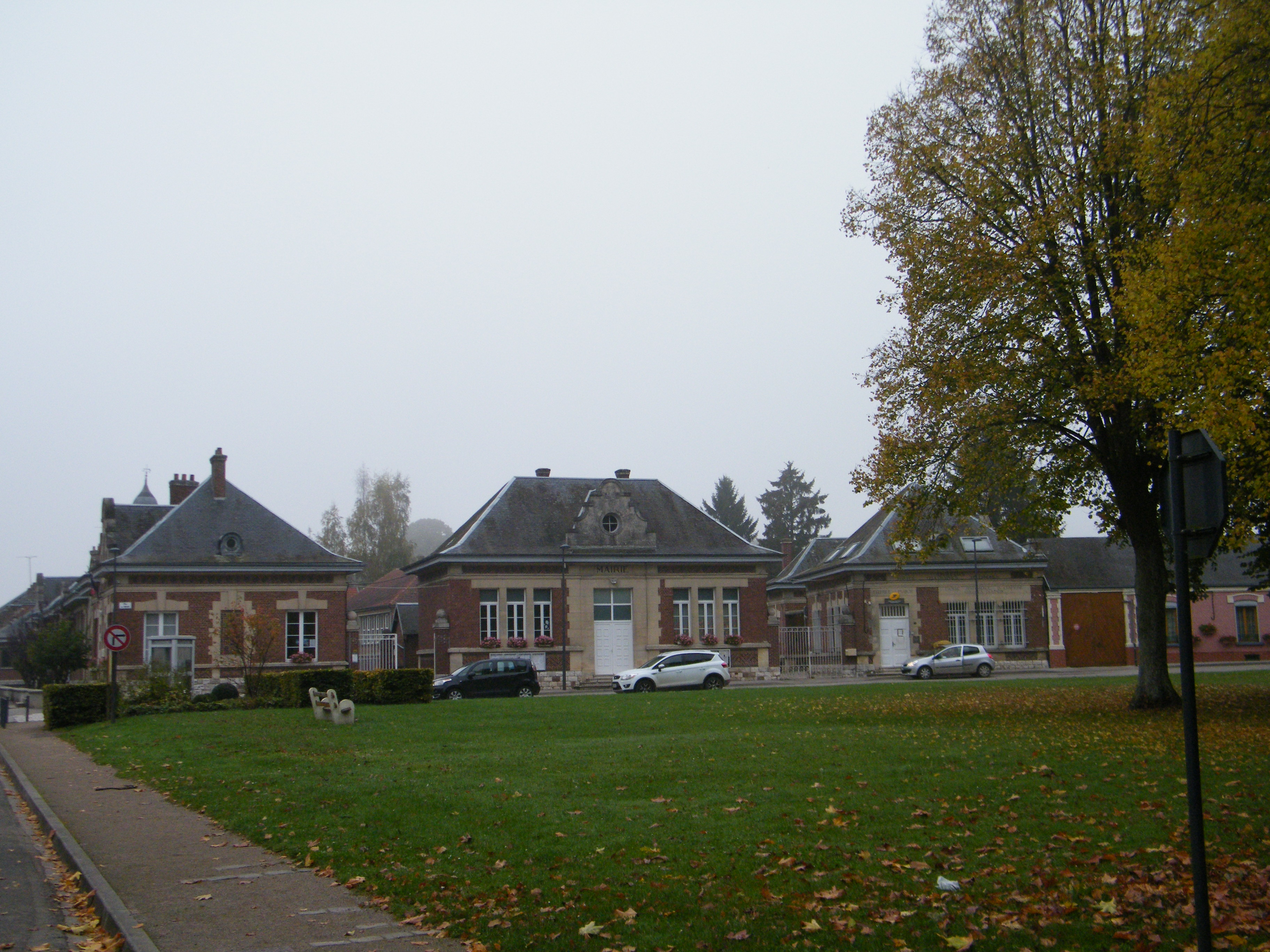 Bâtiments communaux : mairie et école.